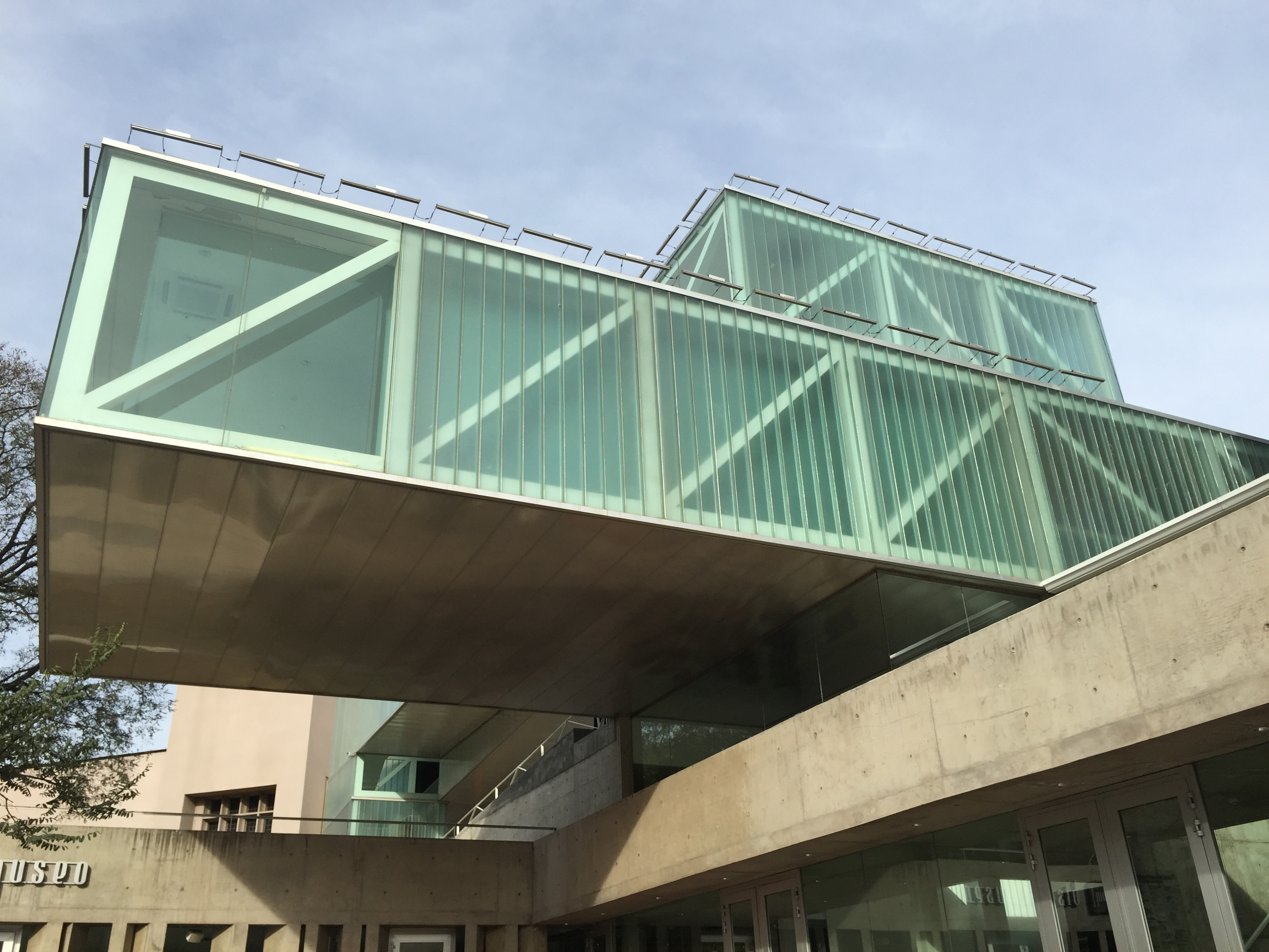 Entrada principal del museo, donde se encuentra un pasillo de exposición.